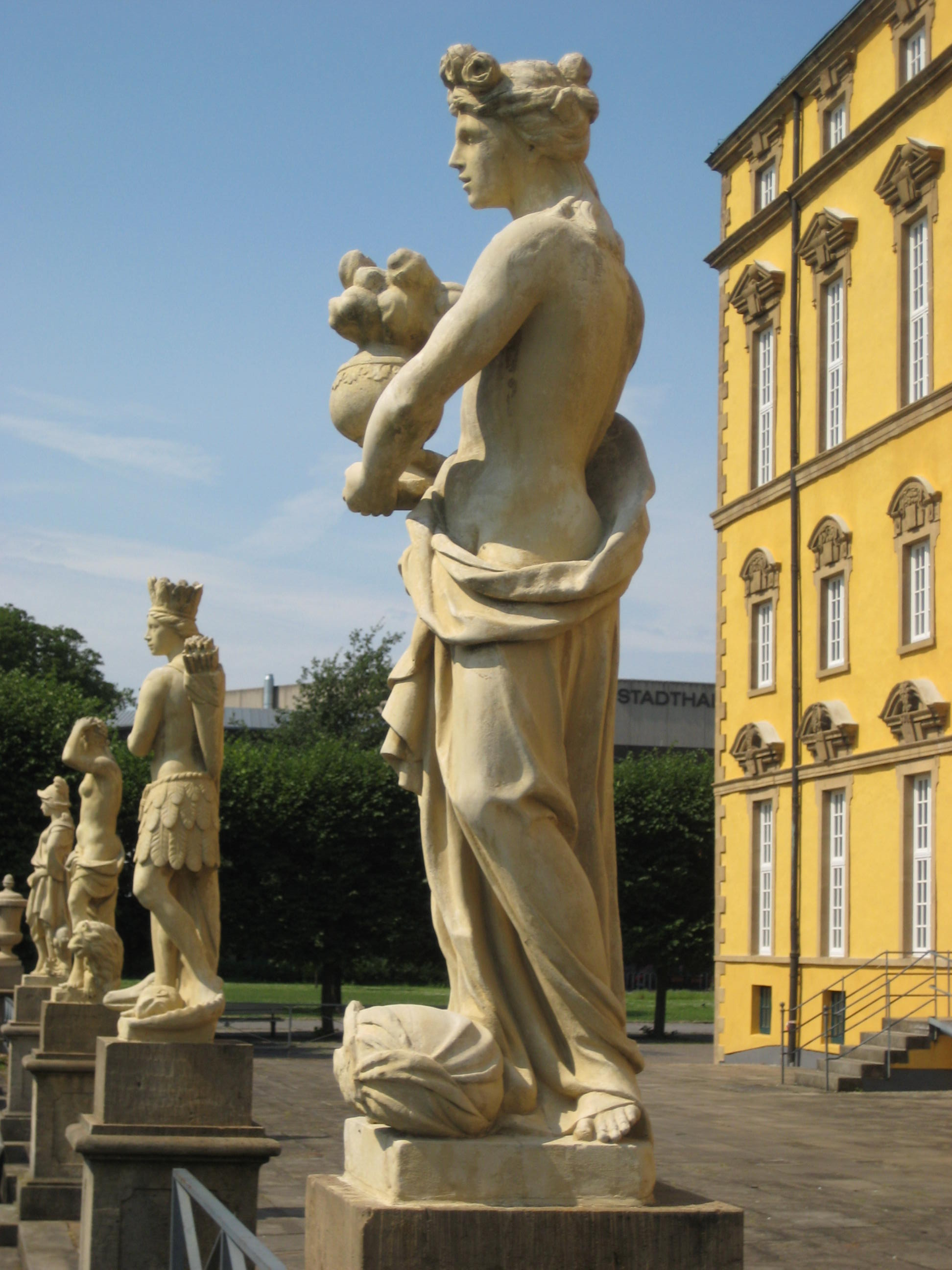 Von Fritz Szalinski rekonstruierte Skulpturen (um 1740) im Schlossgarten von Schloss Osnabrück, ursprünglich vermutlich vom Rittergut Eggermühlen